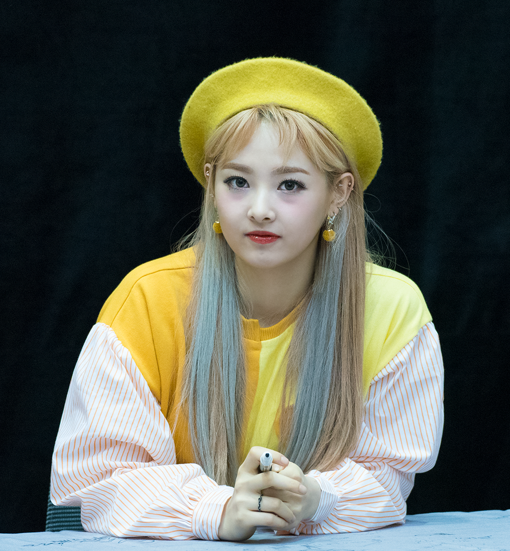 170219 소나무 (Sonamoo) 광주 팬사인회 - 뉴썬 (Newsun)